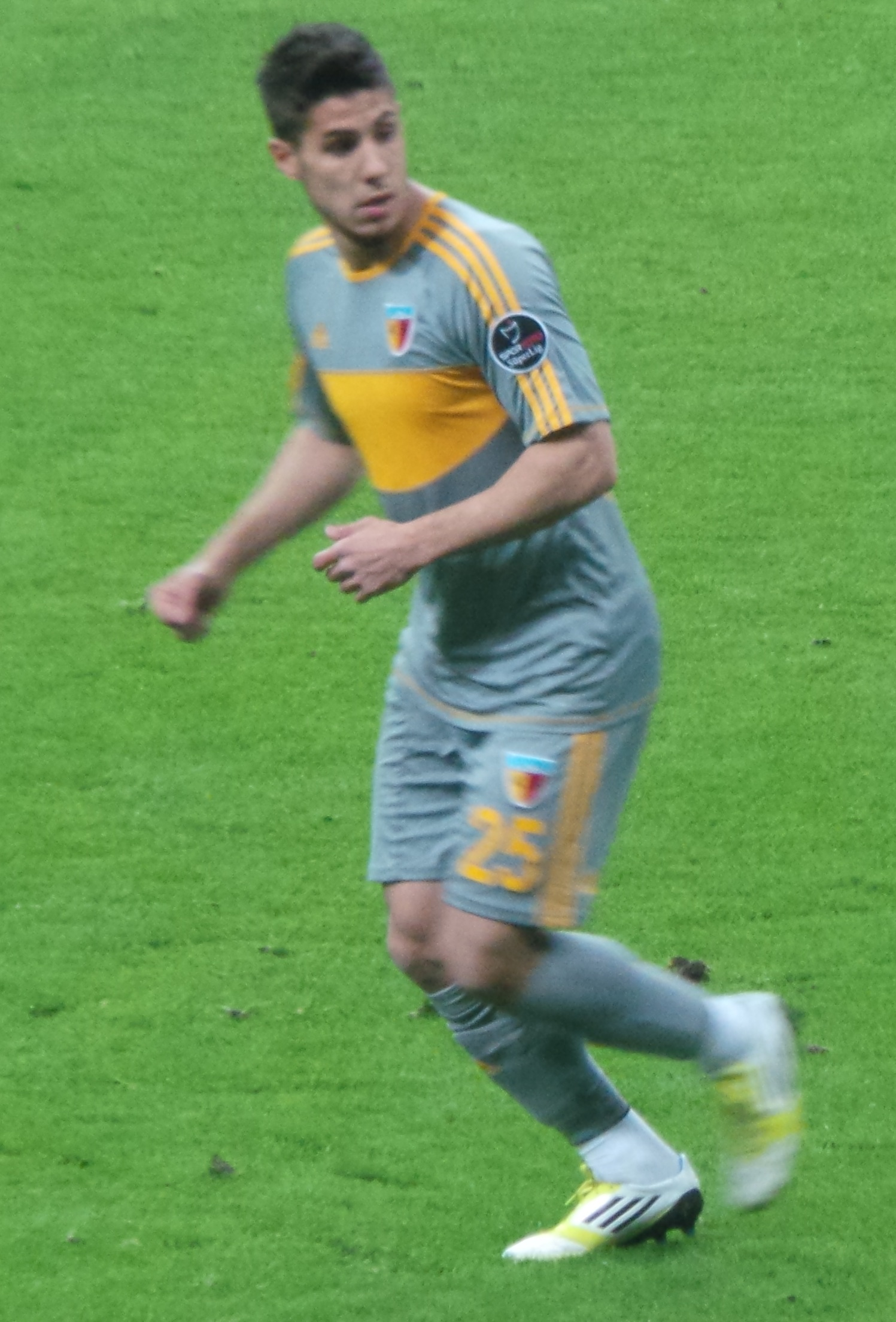 Alper Uludağ